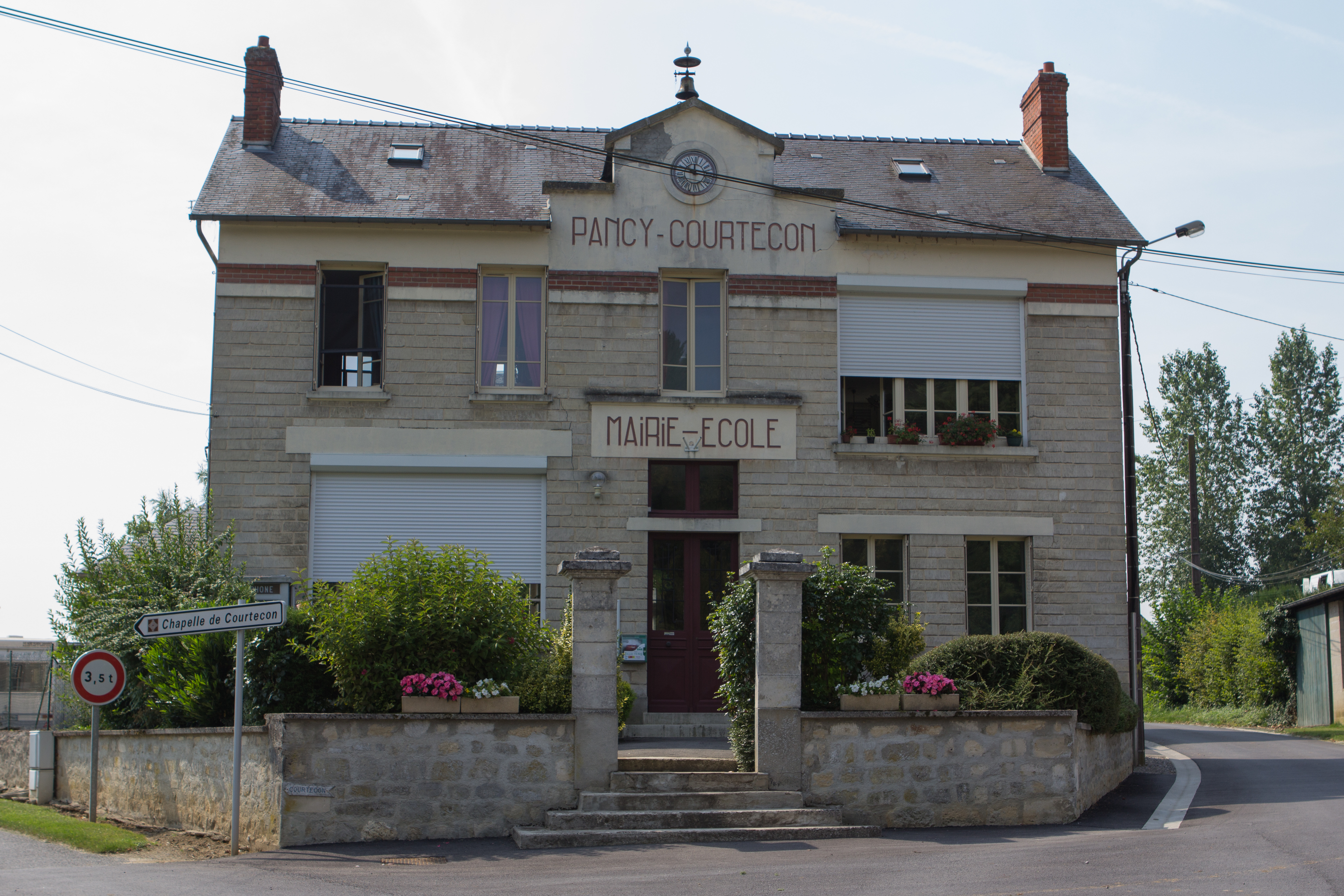 Mairie de Pancy-Courtecon, Pancy-Courtecon, Aisne, France